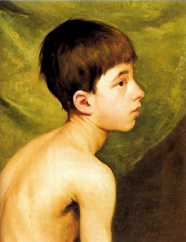 Retrato do aluno Conceição, óleo sobre cartão